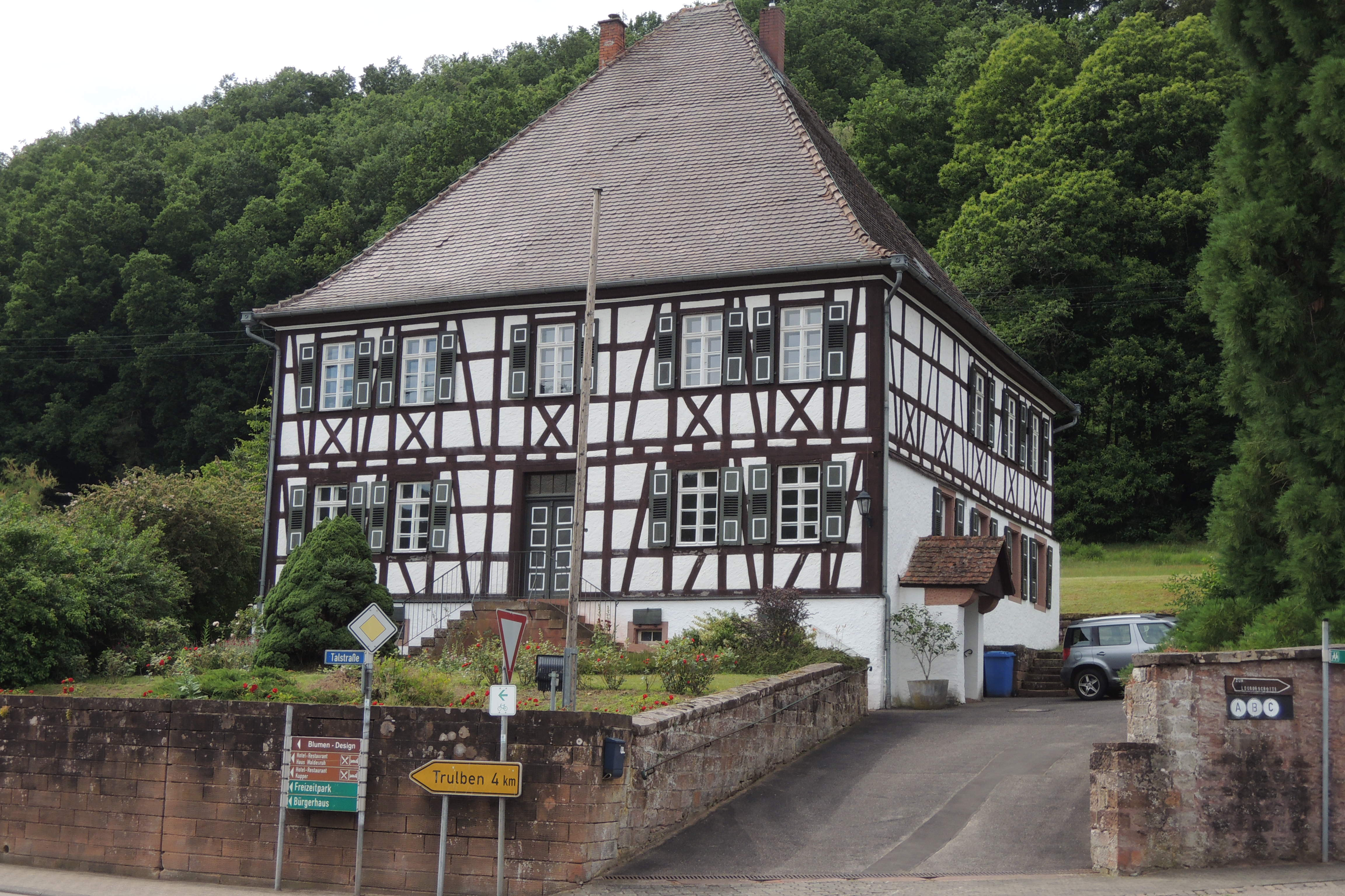 Dies ist ein Bild eines Fachwerkhauses in Eppenbrunn (Talstraße 43). Das Haus steht auf der Denkmalliste des Landes Rheinland-Pfalz.